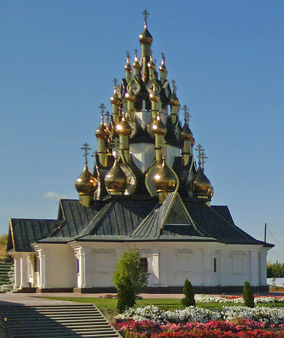 Храм Спаса Преображения 2012 Серафимович